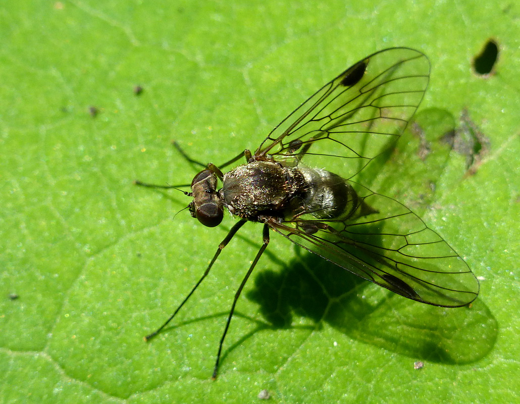 Chrysopilus erythrophthalmus female, location: Slovakia, Starohorské vrchy, Uľanka (časť Banskej Bystrice)